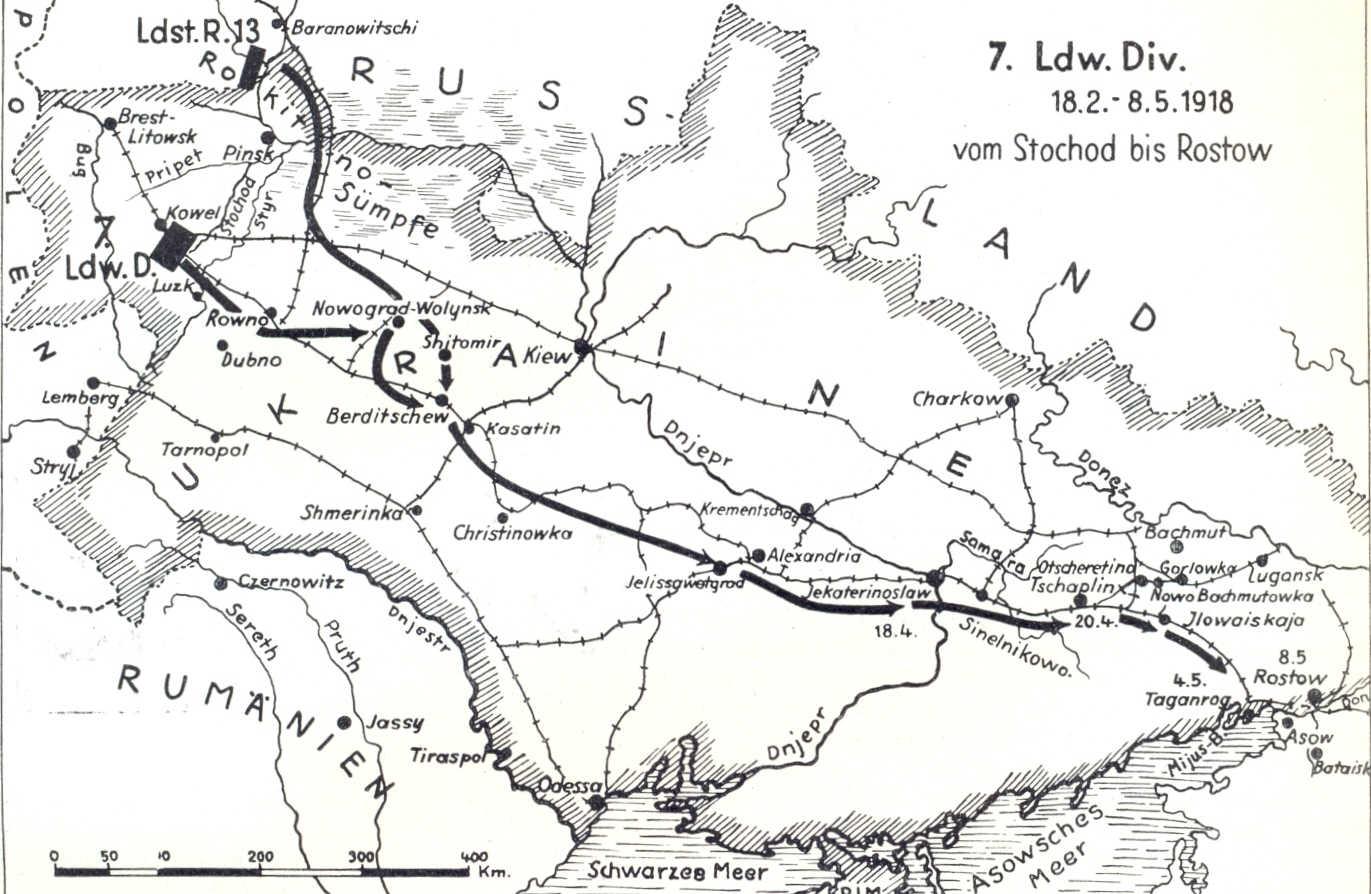 Karte: Die 7. Ldw.Div in der Ukraine 1918